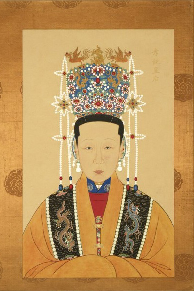 中文（中国大陆）: 作者已经去世超过200年，作品已经进入公有领域。